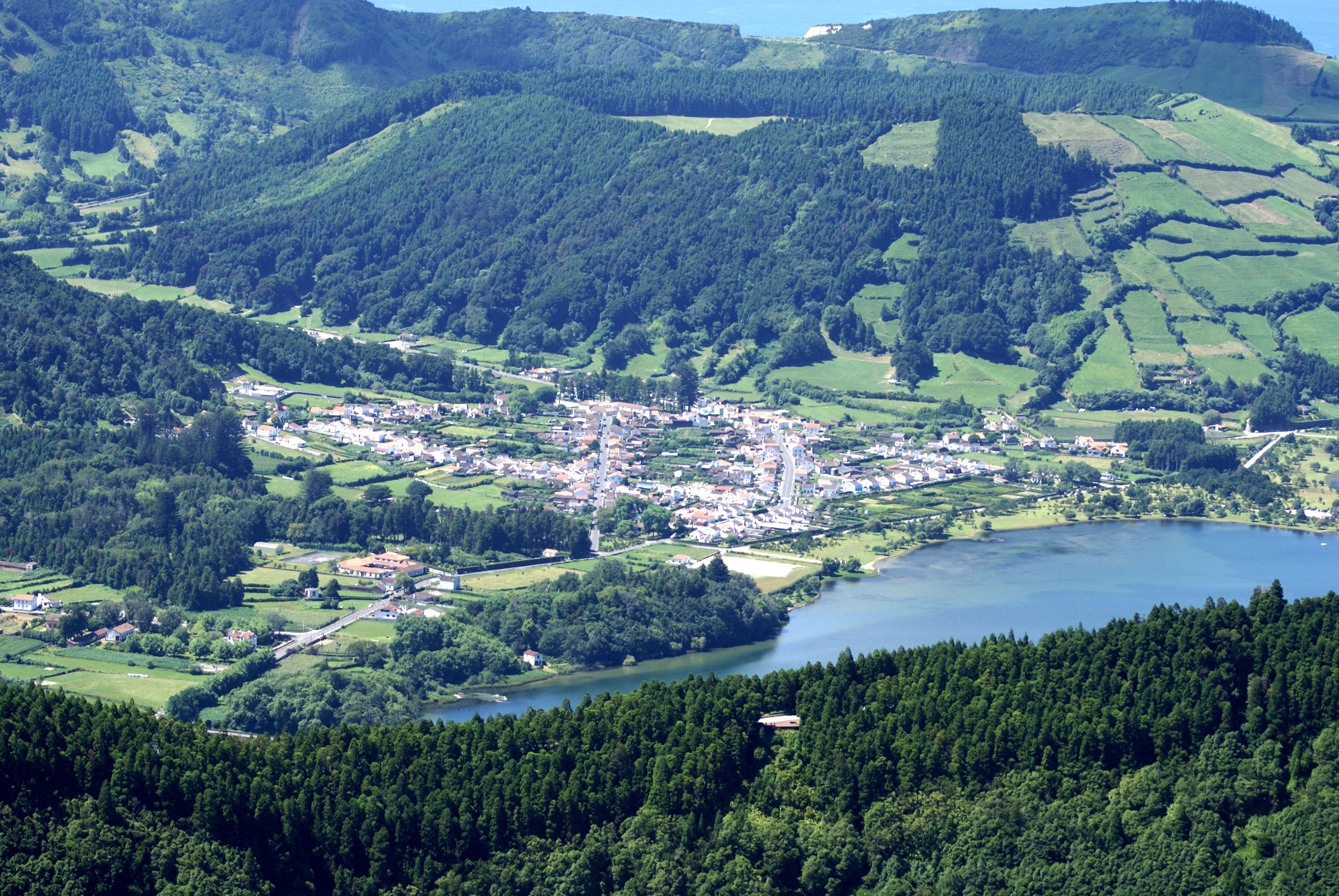 Miradouro da Boca do Inferno, povoado das Sete Cidades, ilha de São Miguel, Açores